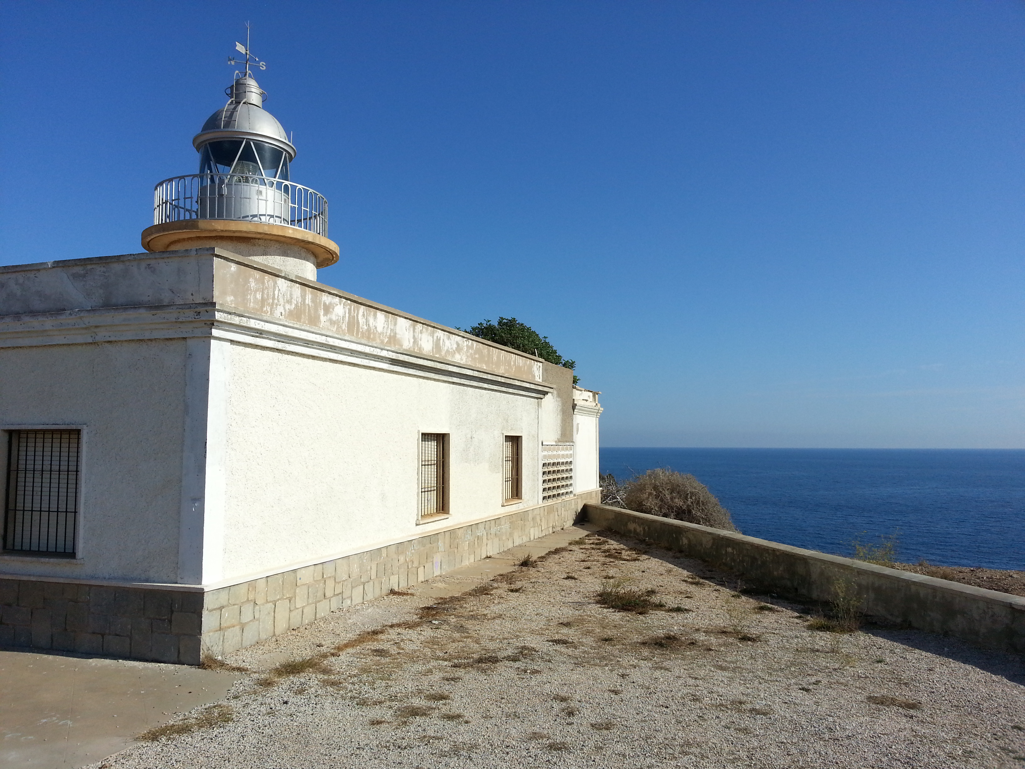 Vista del Faro de Portman